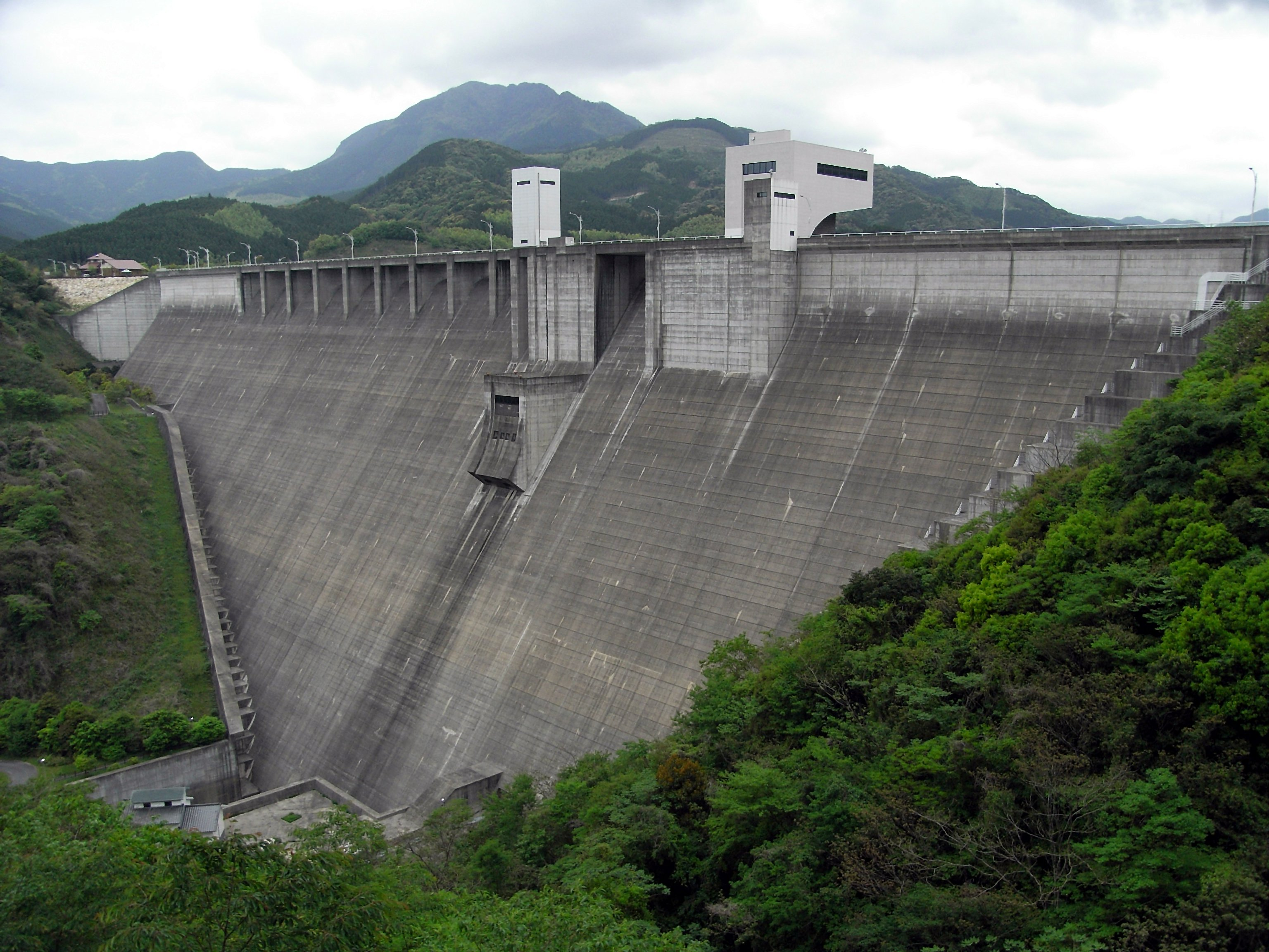 Dam